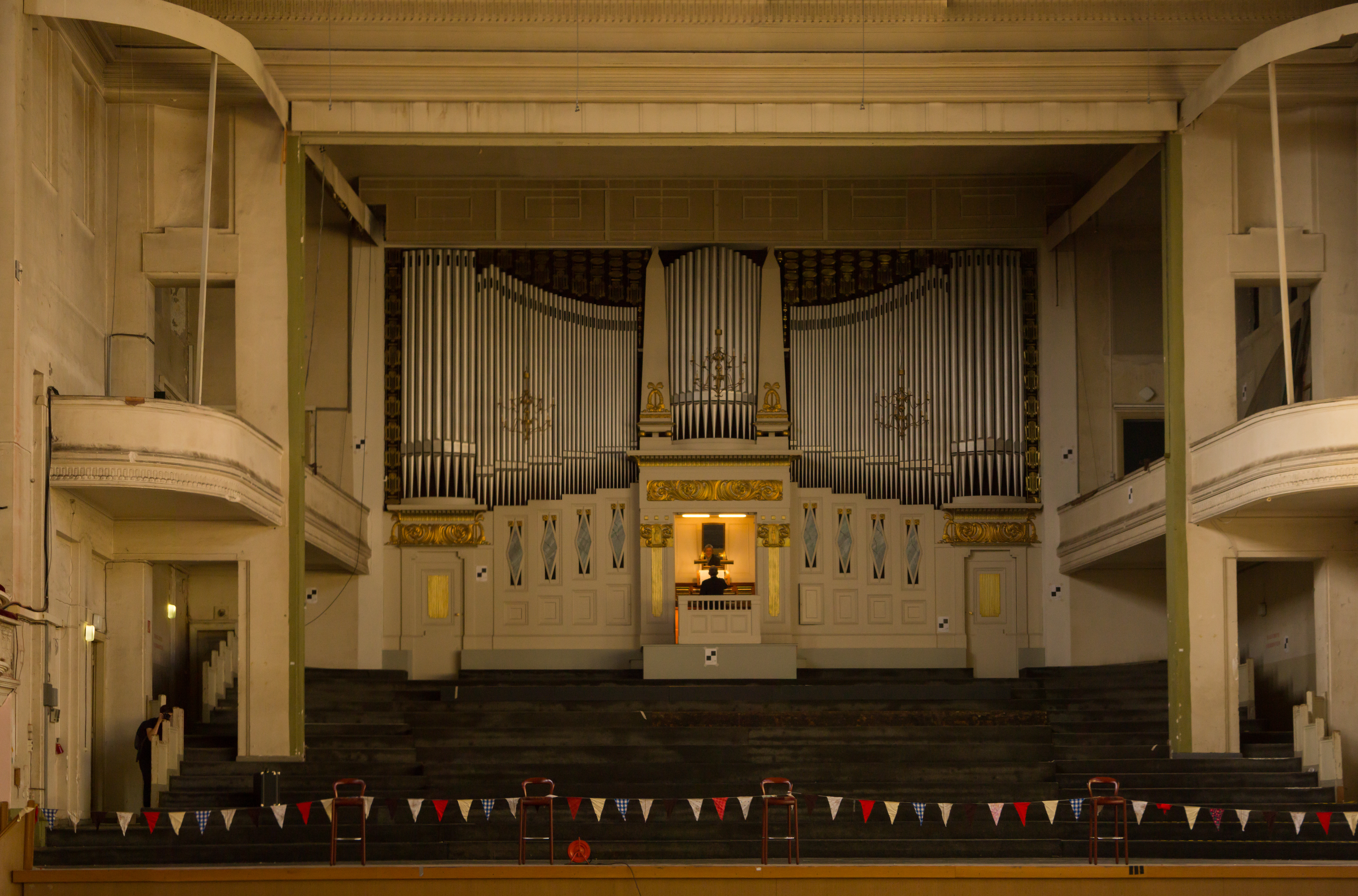 Konzertorgel, Stadthalle Görlitz